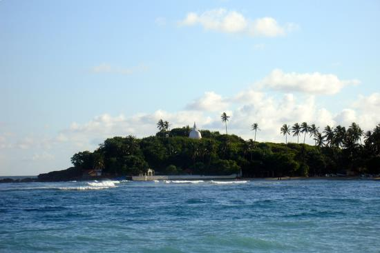 Dagoba in Unawatuna, Sri Lanka